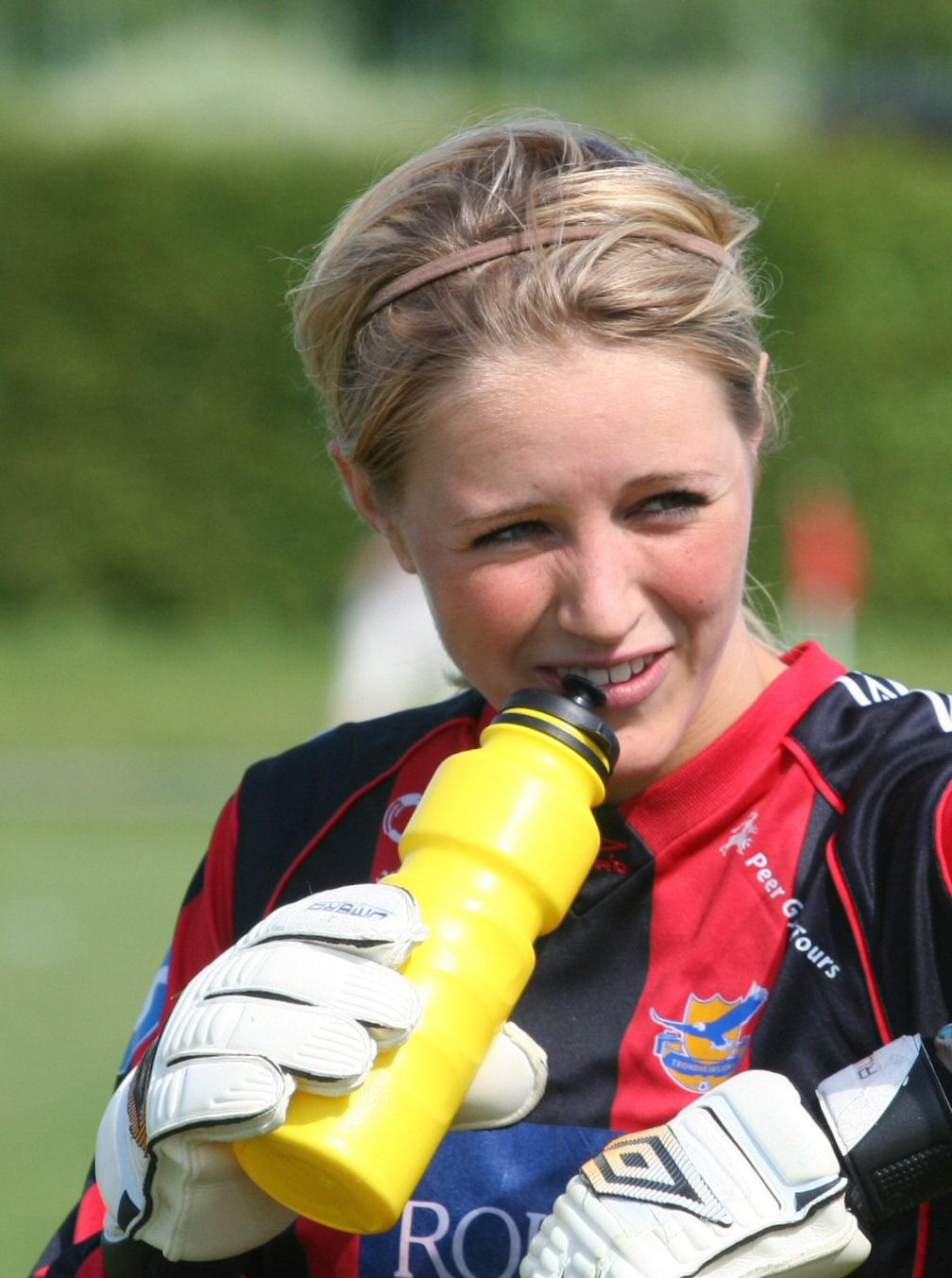 Fotballspilleren Runa Barli